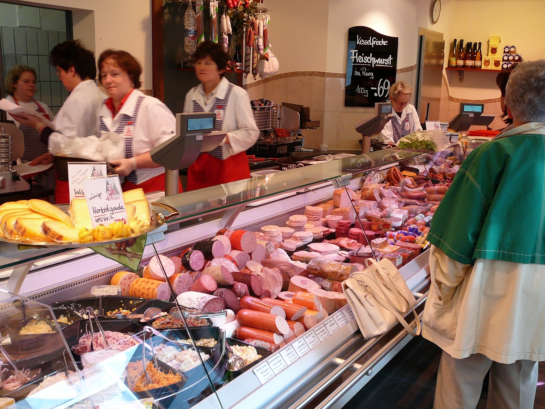 Metzgerladen mit Verkaufstheke (Verkaufsvitrine) einer Metzgerei in Donaueschingen in Baden-Württemberg, Deutschland.